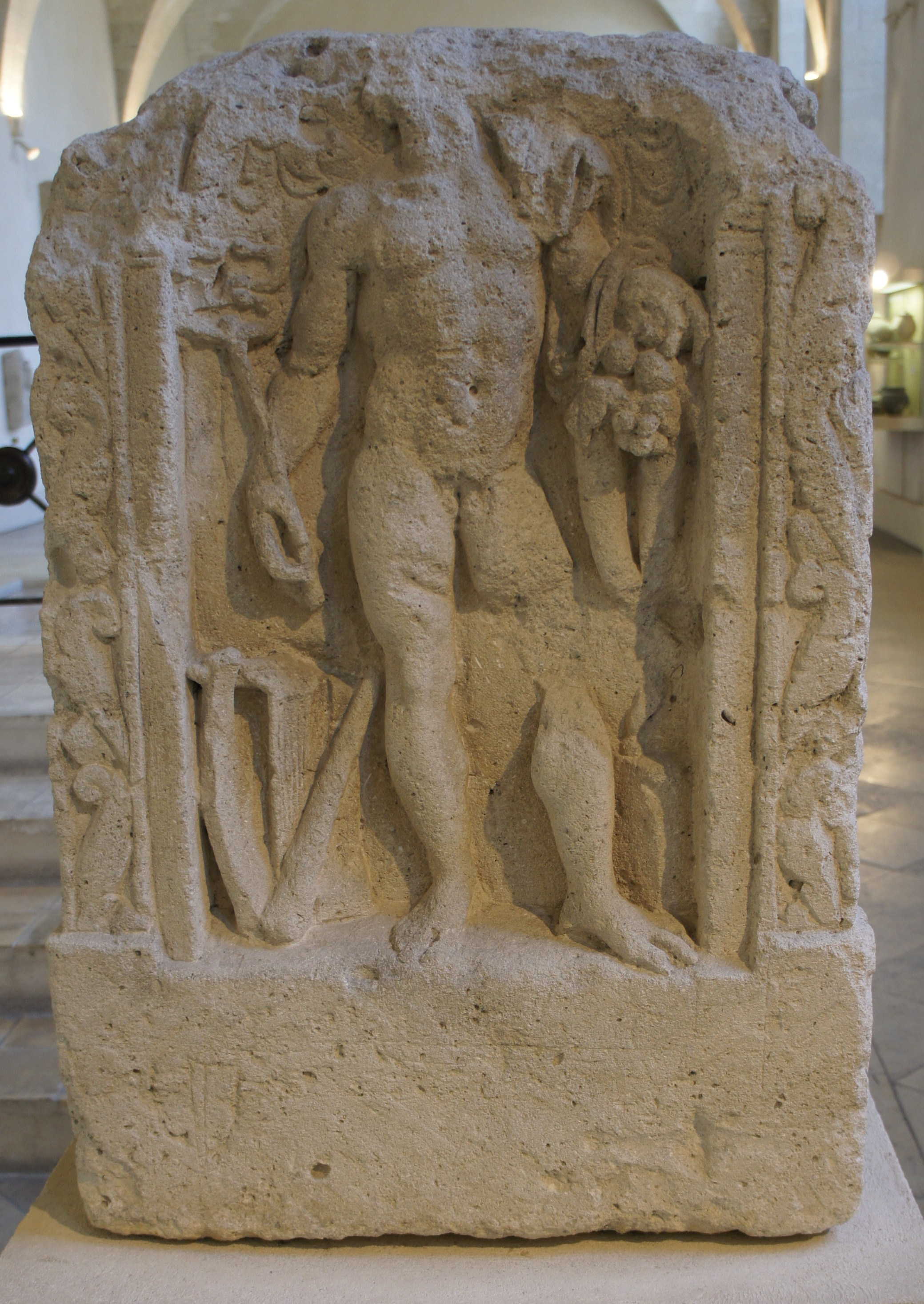 Dans la salle Roman antiquities du Musée Saint-Remi, bloc à quatres face, chacun une divinité, trouvé rue du temple avant 1897.